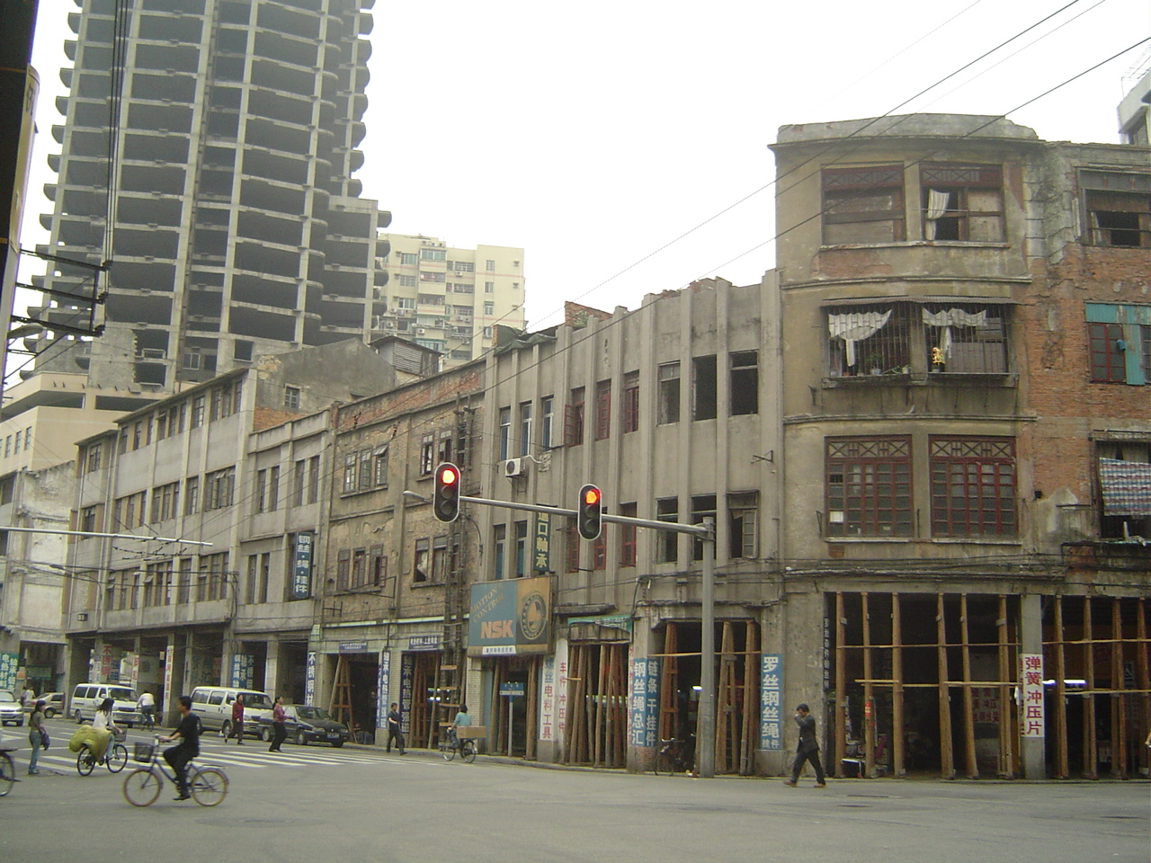 廣州市大德路與海珠中路交界